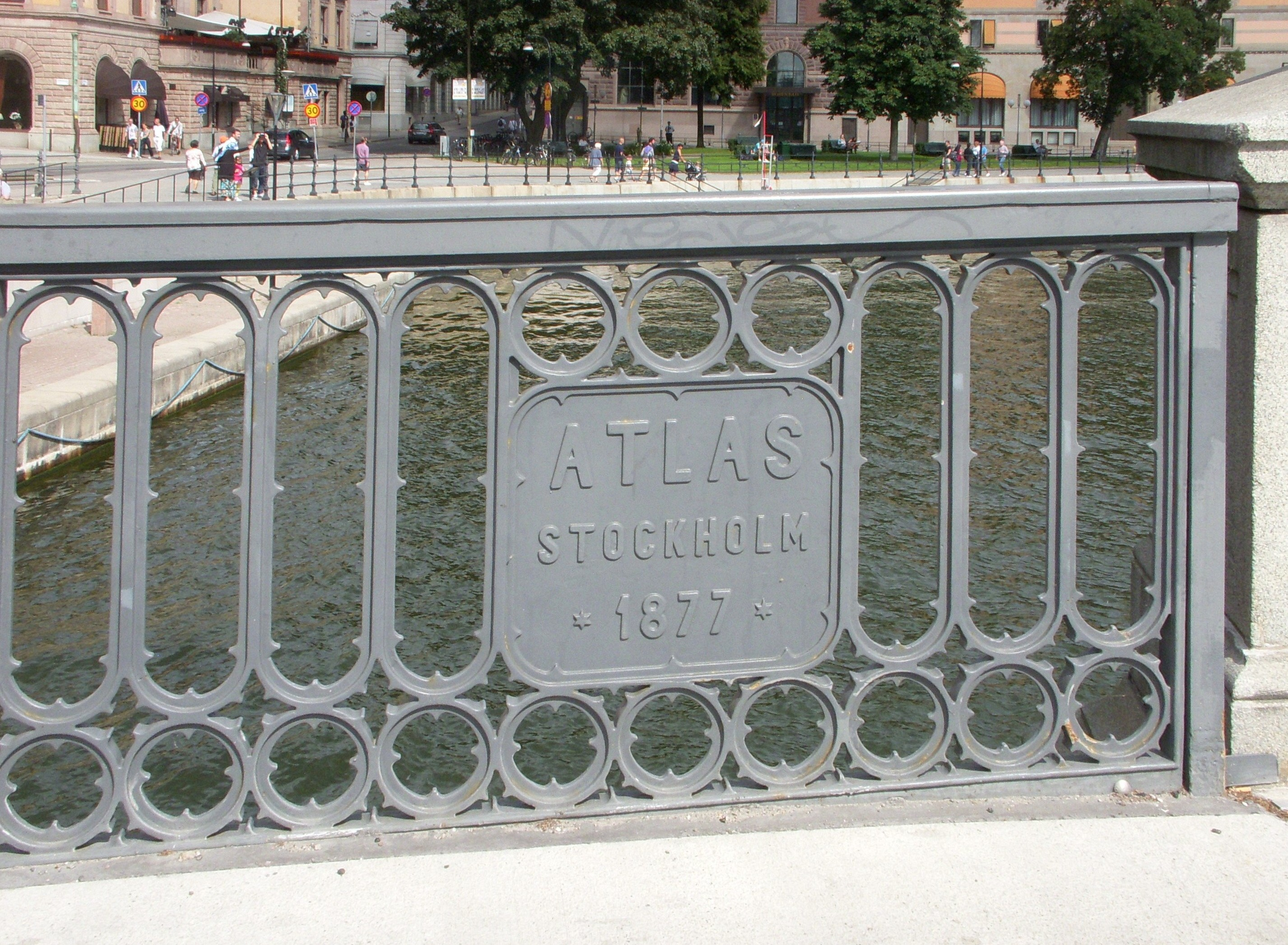 Vasabron i Stockholm, räcke